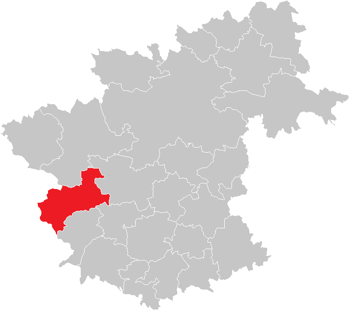 Bezirk Zwettl